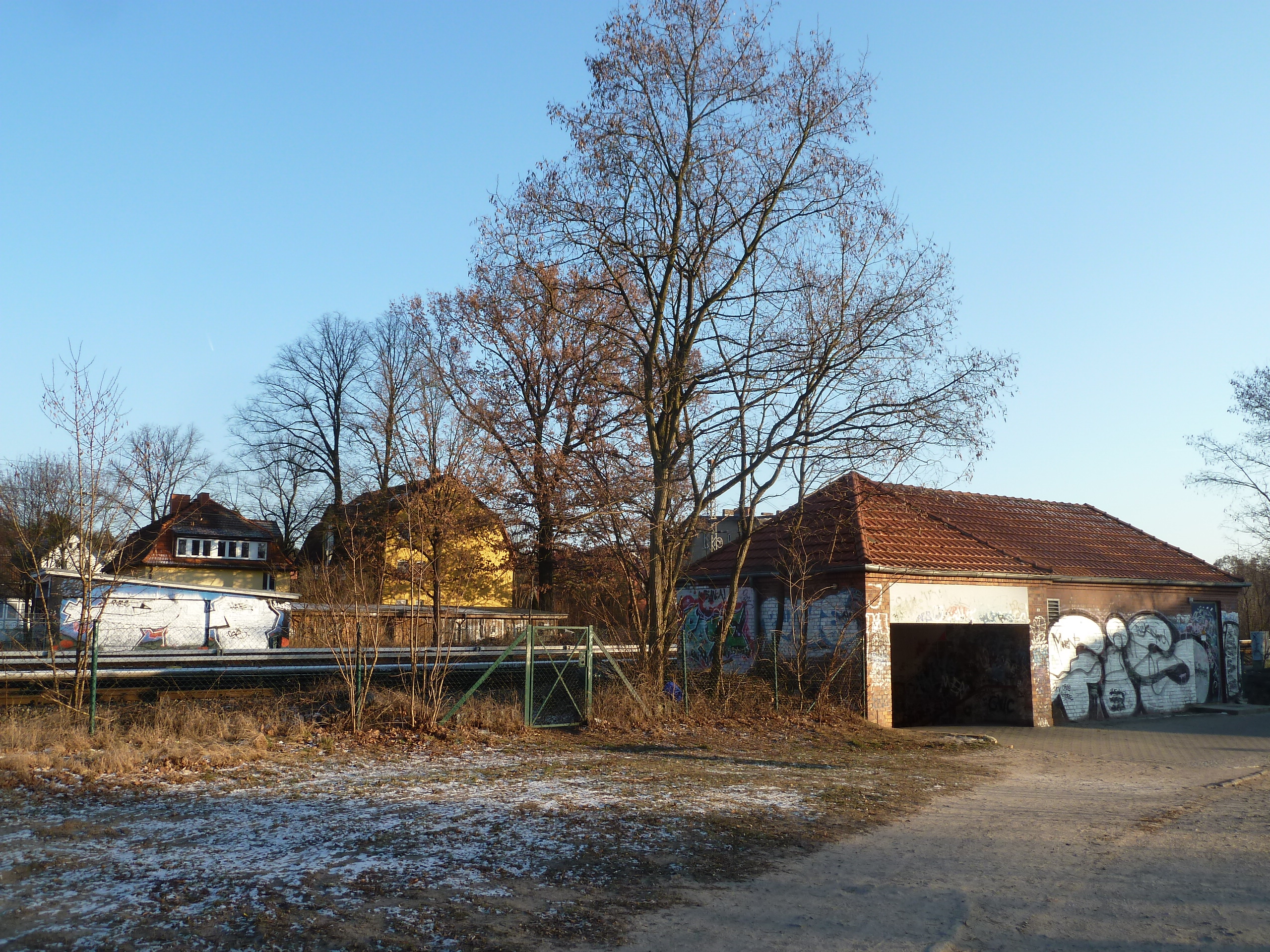 Bahnhof Hohen Neuendorf, Tunnel südlich des Bahnhofs